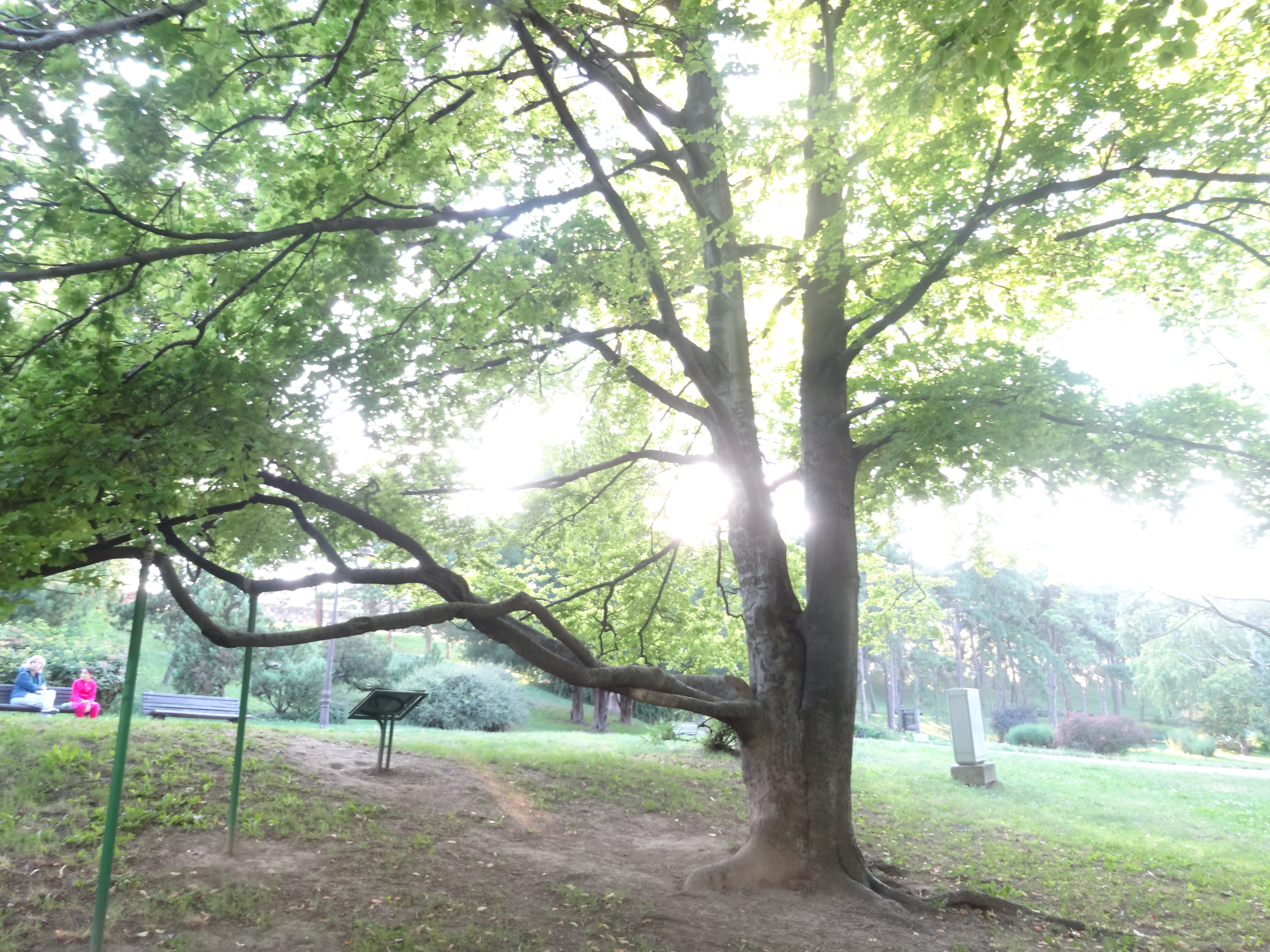 Природни споменик Европска буква на Калемегдану Ово је фотографија заштићеног природног добра у Србији под шифром: СП013 This is a a photo of a natural area in Serbia with ID: СП013